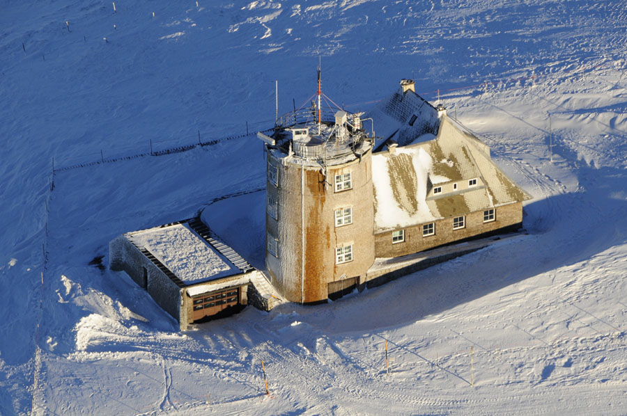 Luftaufnahme Wetterstation Feldberg Schwarzwald.